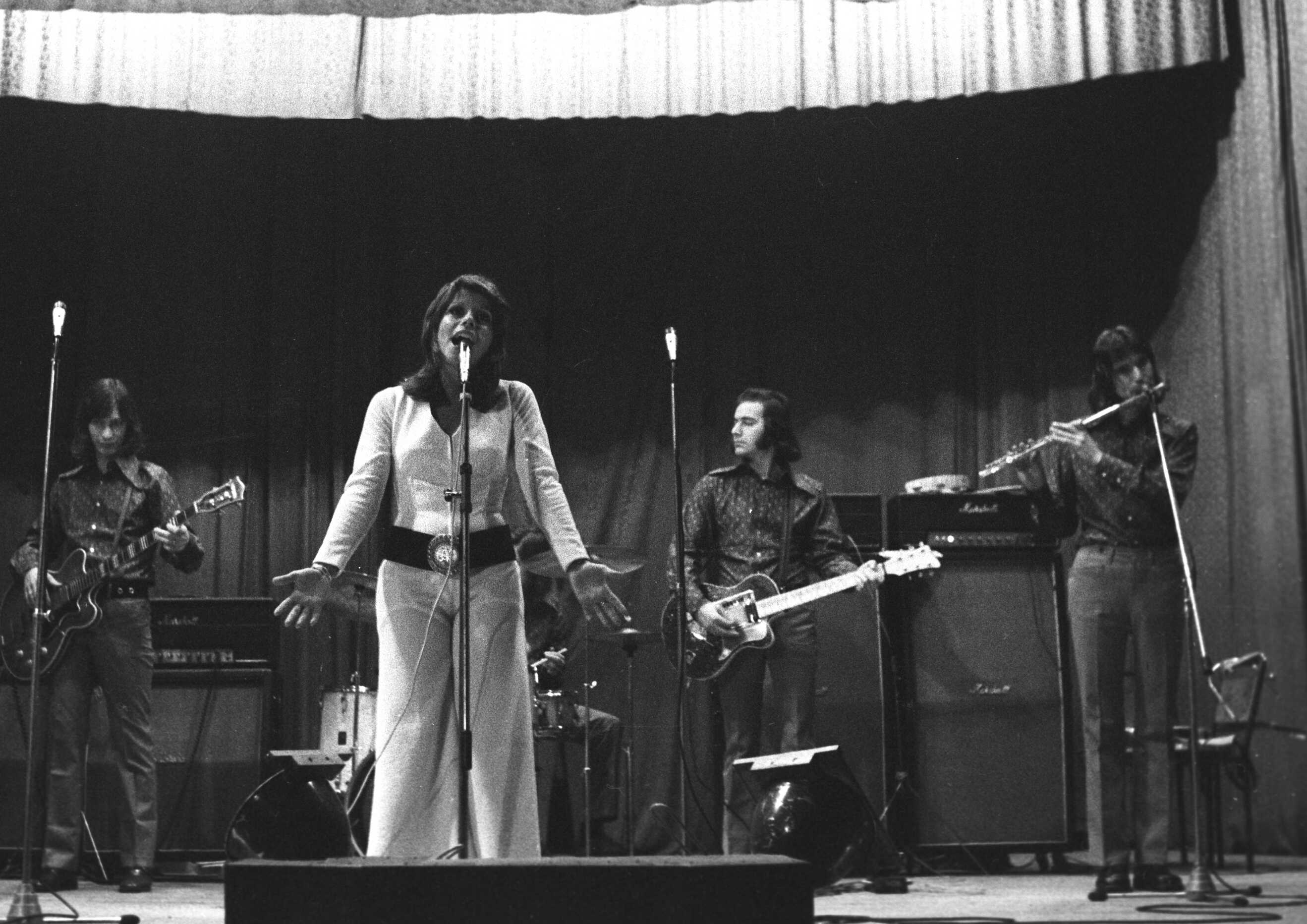 Bódy Magdi és a Corvina együttes: Soltész Rezső, Szigeti Ferenc, Soltész Gábor. Location: Hungary Tags: singing Title: Bódy Magdi és a Corvina együttes: Soltész Rezső, Szigeti Ferenc, Soltész Gábor.